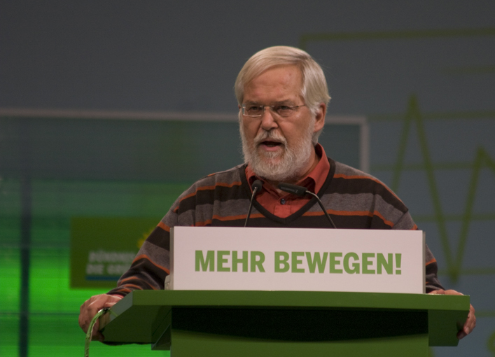 Roland Vogt · während der Bundesdelegiertenkonferenz 11·2008 in Erfurt